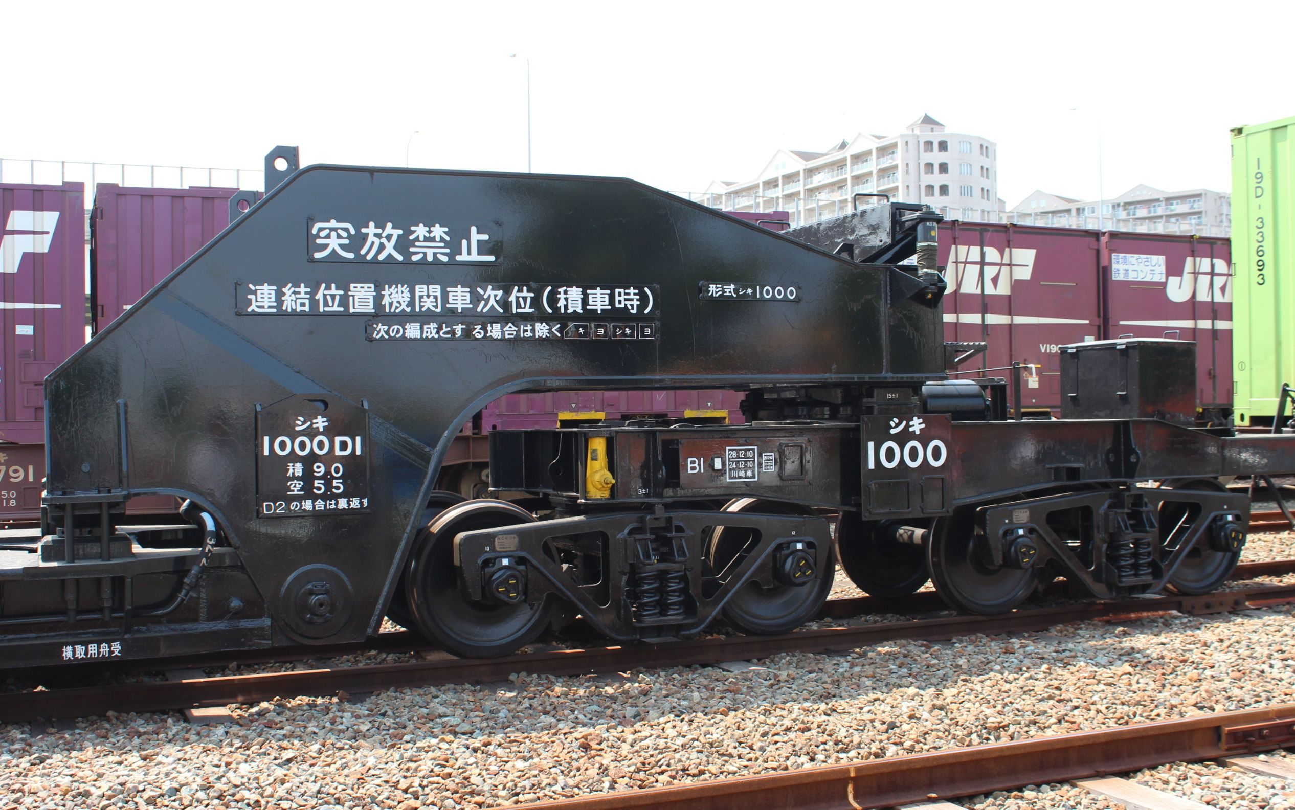 JR貨物シキ1000形貨車